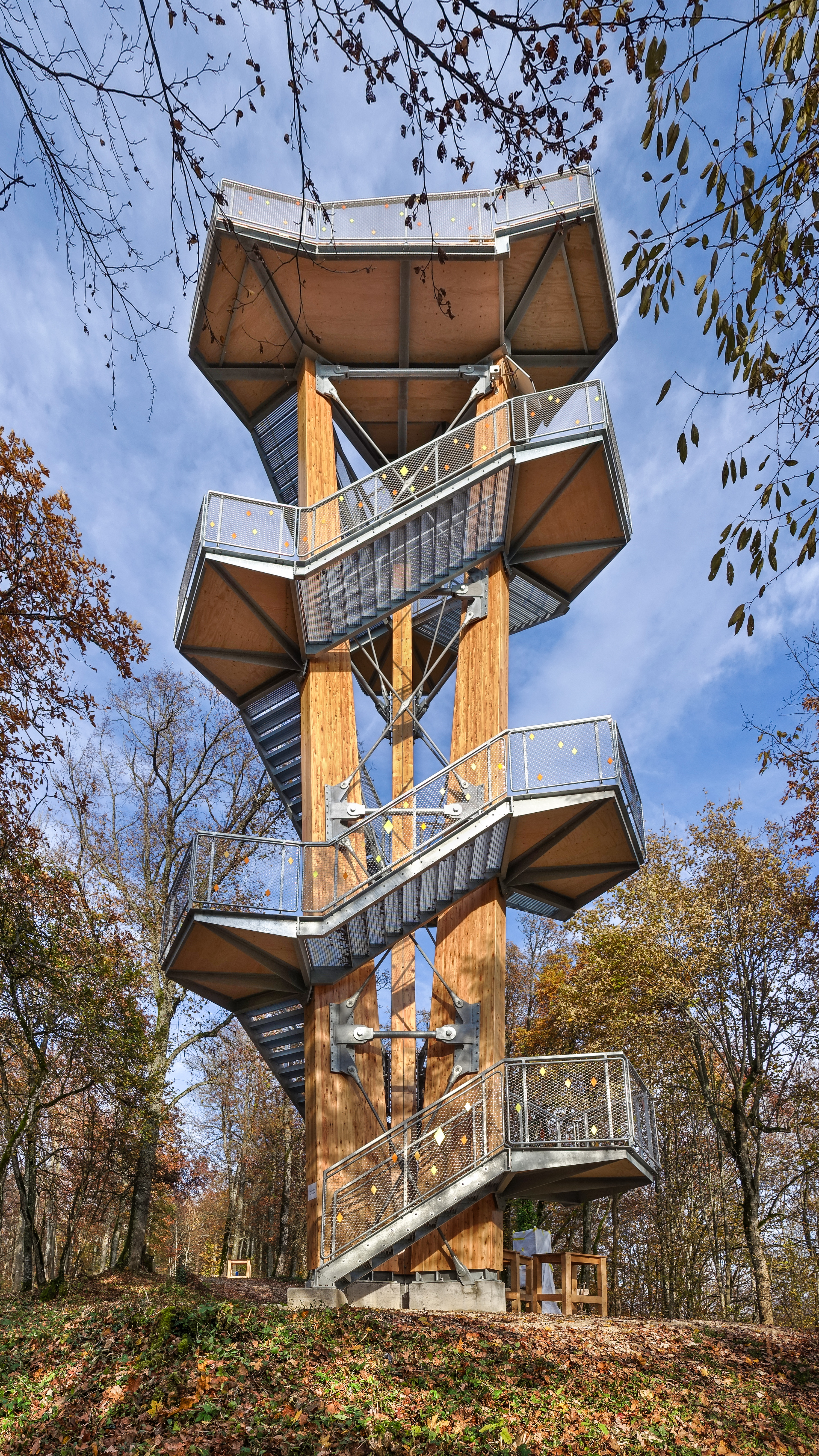 Der neue Siblinger Randenturm seit Oktober 2014. Südwestseite